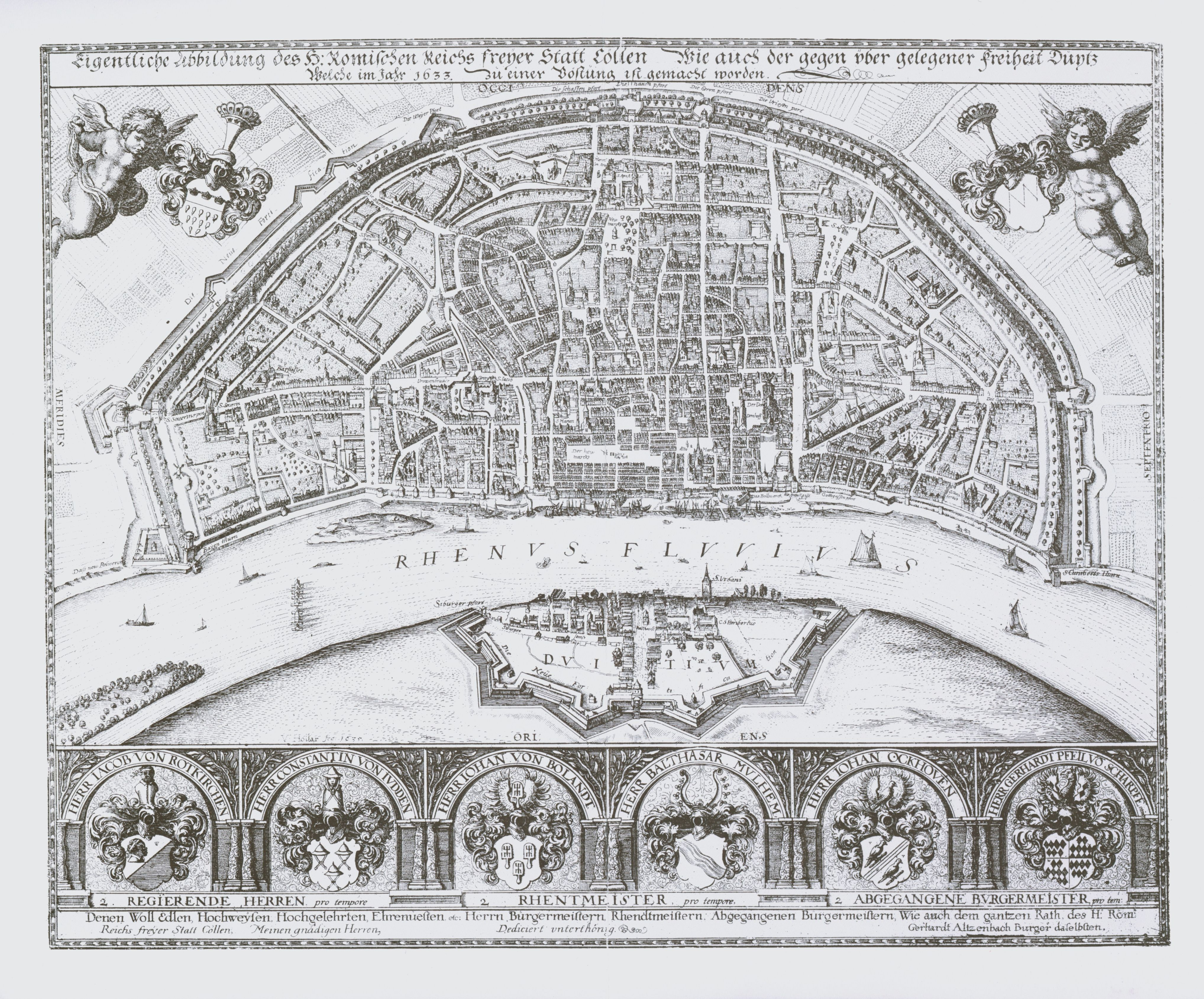 Kölner Stadtplan von Wenzel Hollar, Kupferstich, 32 x 26 cm